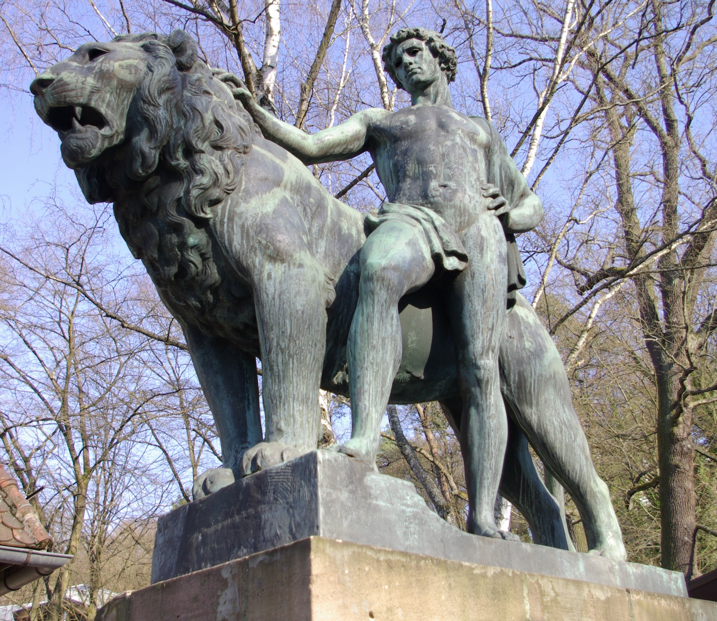 Linke Statue der Figurengruppe mit Löwen (1912) von Philipp Kittler am Eingangsportal des Tiergarten Nürnberg